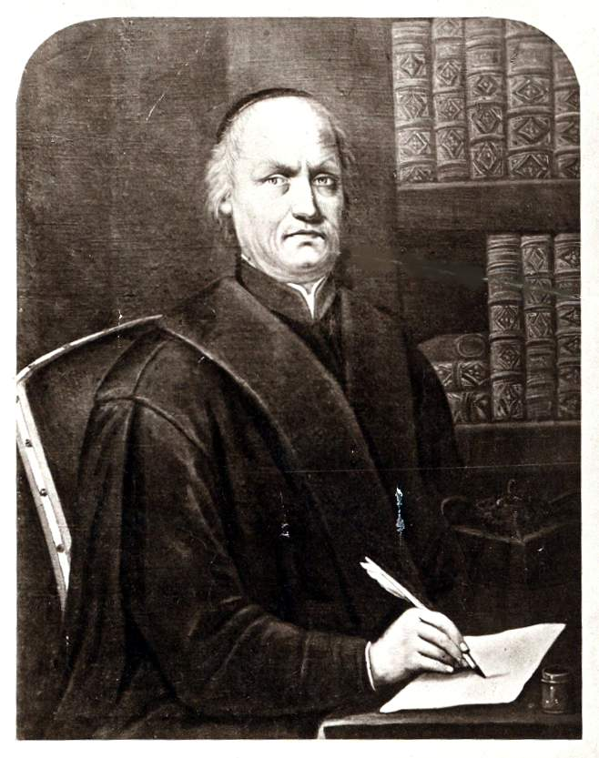 Stadtbibliothek Trier, Trierer Porträts 182: Christoph Brouwer (1559-1617)